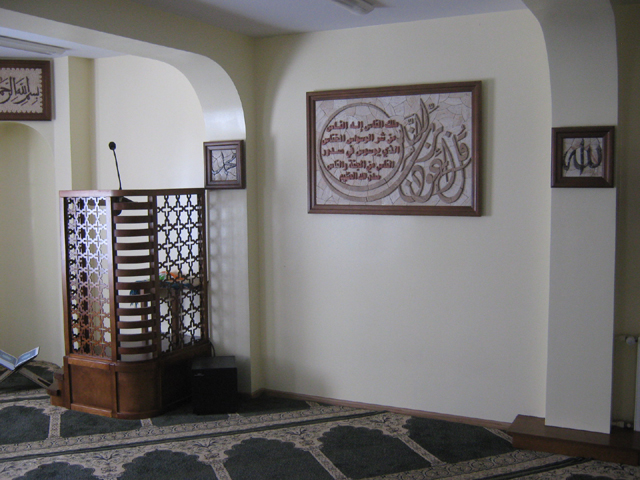 widok na sure z koranu